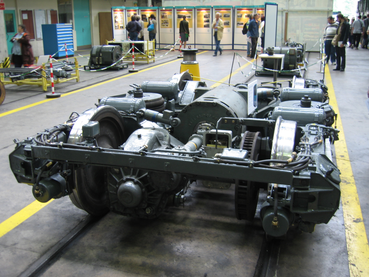 Bogie de MF 67. JPO Atelier de Bobigny 24/05/2008.